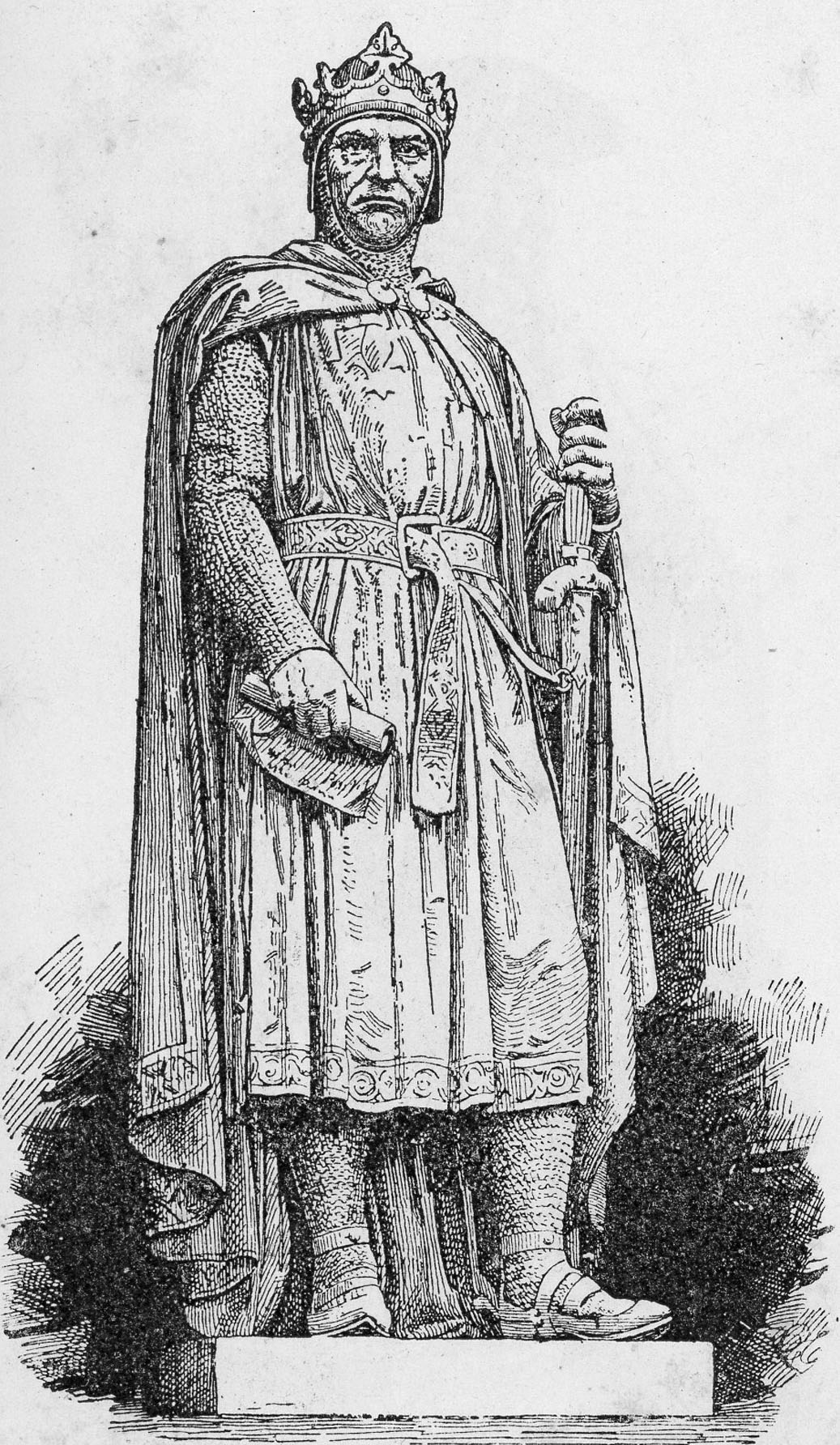 Napoli: Carlo I d’Angiò (statua nel Palazzo Reale).